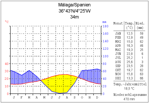 Klimadiagramm Málaga